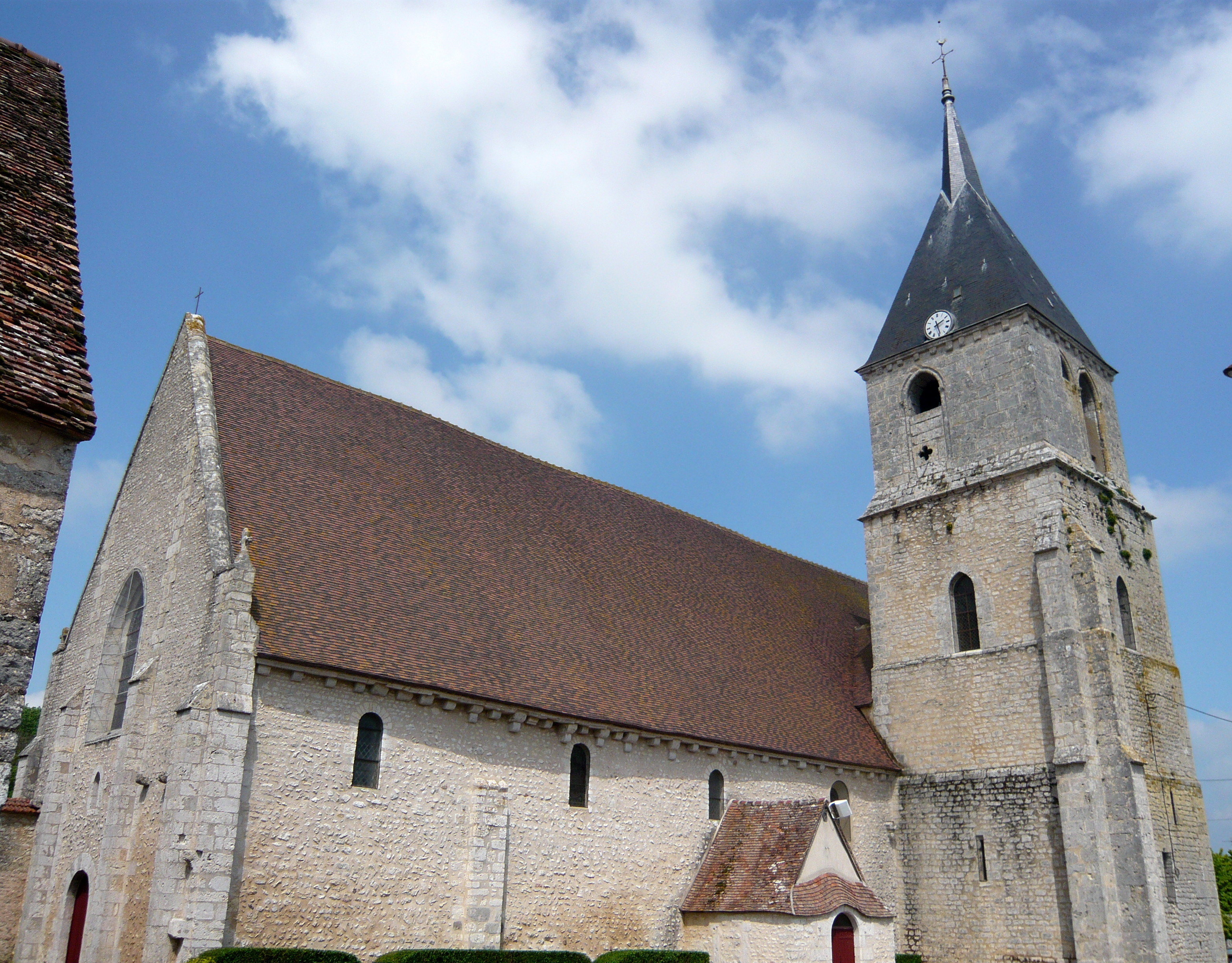 Église de Berchères-les-Pierres, Eure-et-Loir (France).